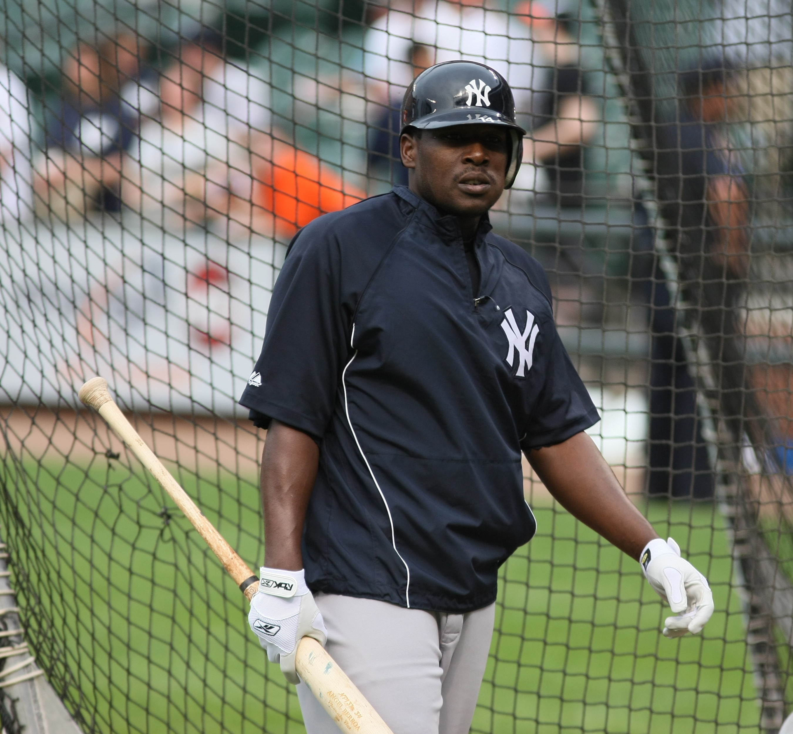 Ángel Berroa